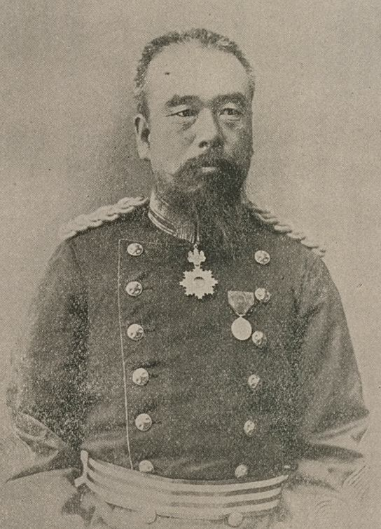 阪井重季男爵（1847～1922）